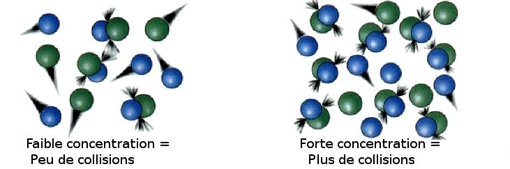 Illustration de la dépendance à la concentration du nombre de collisions de molécules